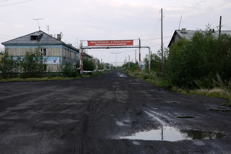 Ул.Победа, бывш.Геологическая